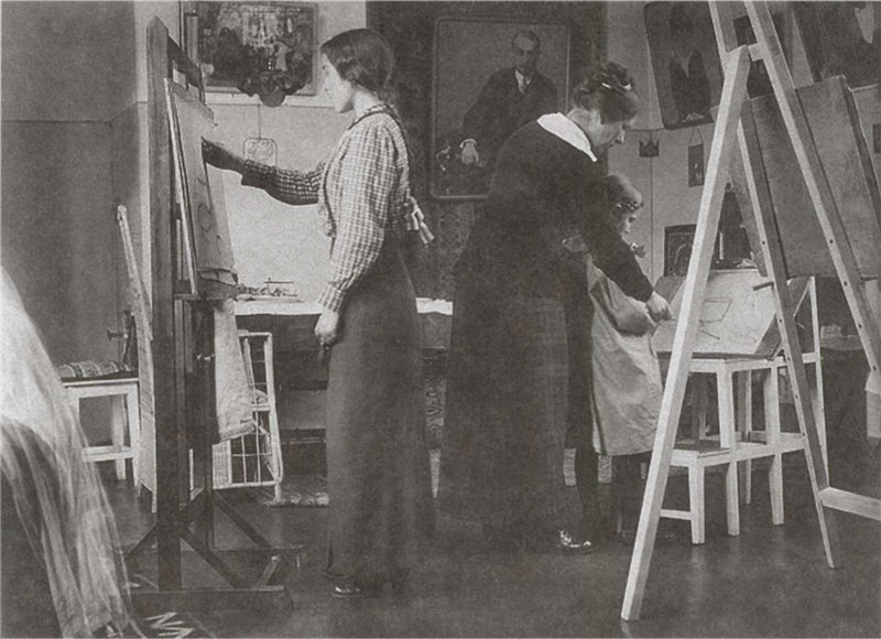 Н. М. Сапожникова преподаёт рисование в мастерской